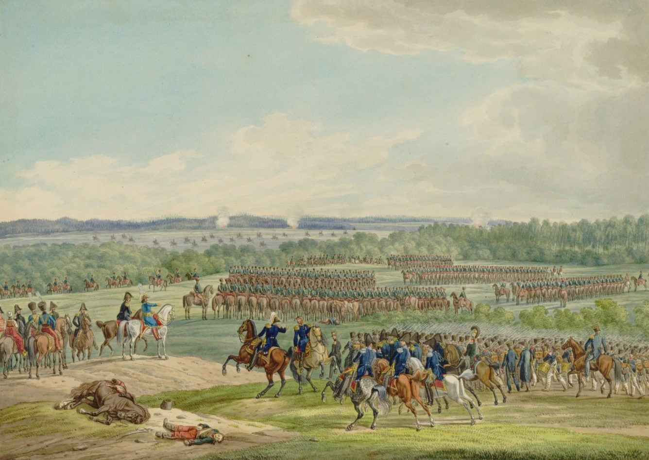 Bataille d'Ostrowno, 25 juillet 1812. Les troupes françaises commandées par Joachim Murat y battirent les Russes du général Ostermann-Tolstoï qui parvinrent néanmoins à faire retraite en bon ordre.